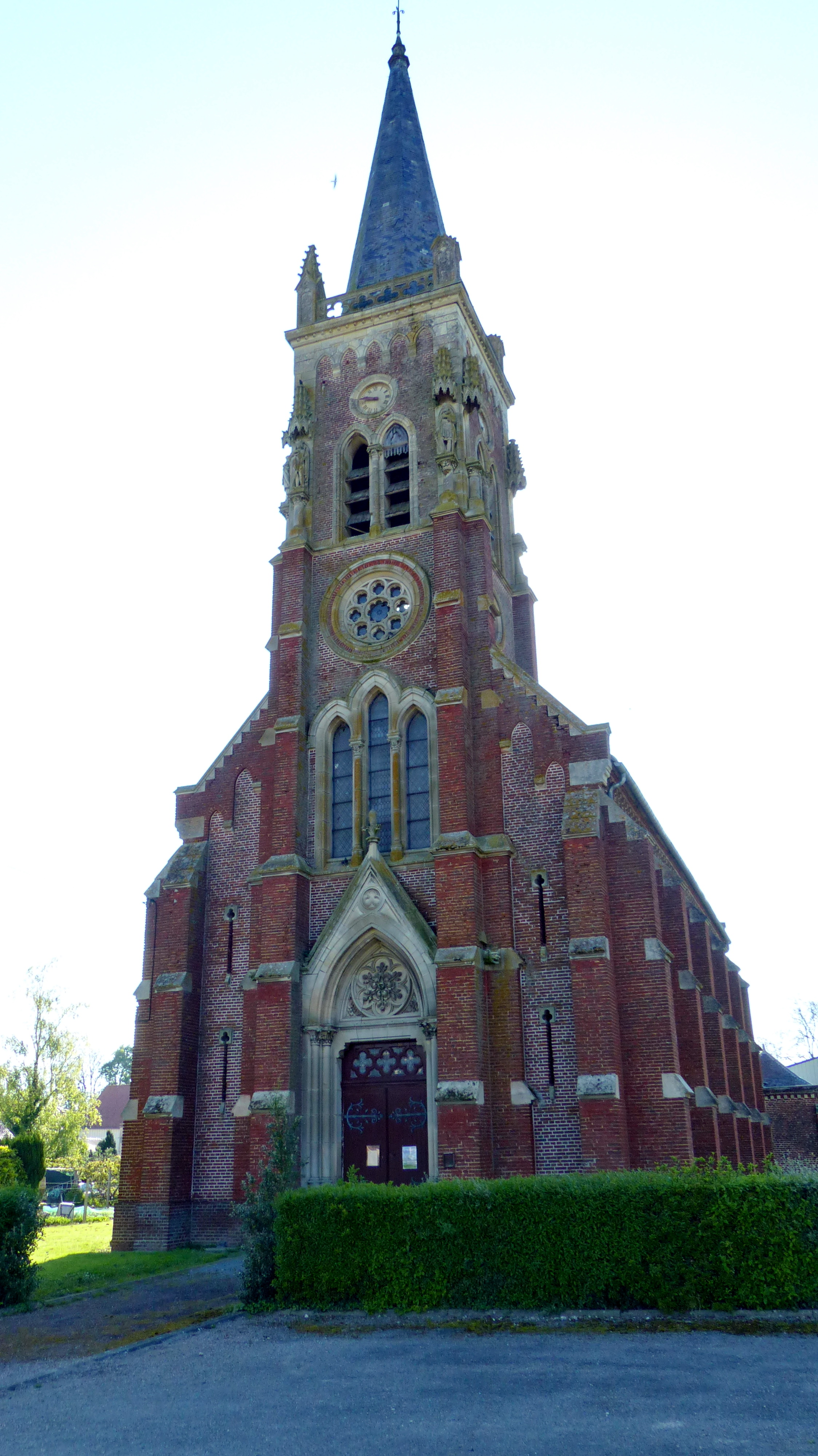 Façade de l'église Saint-Pierre de Fleury (Somme)